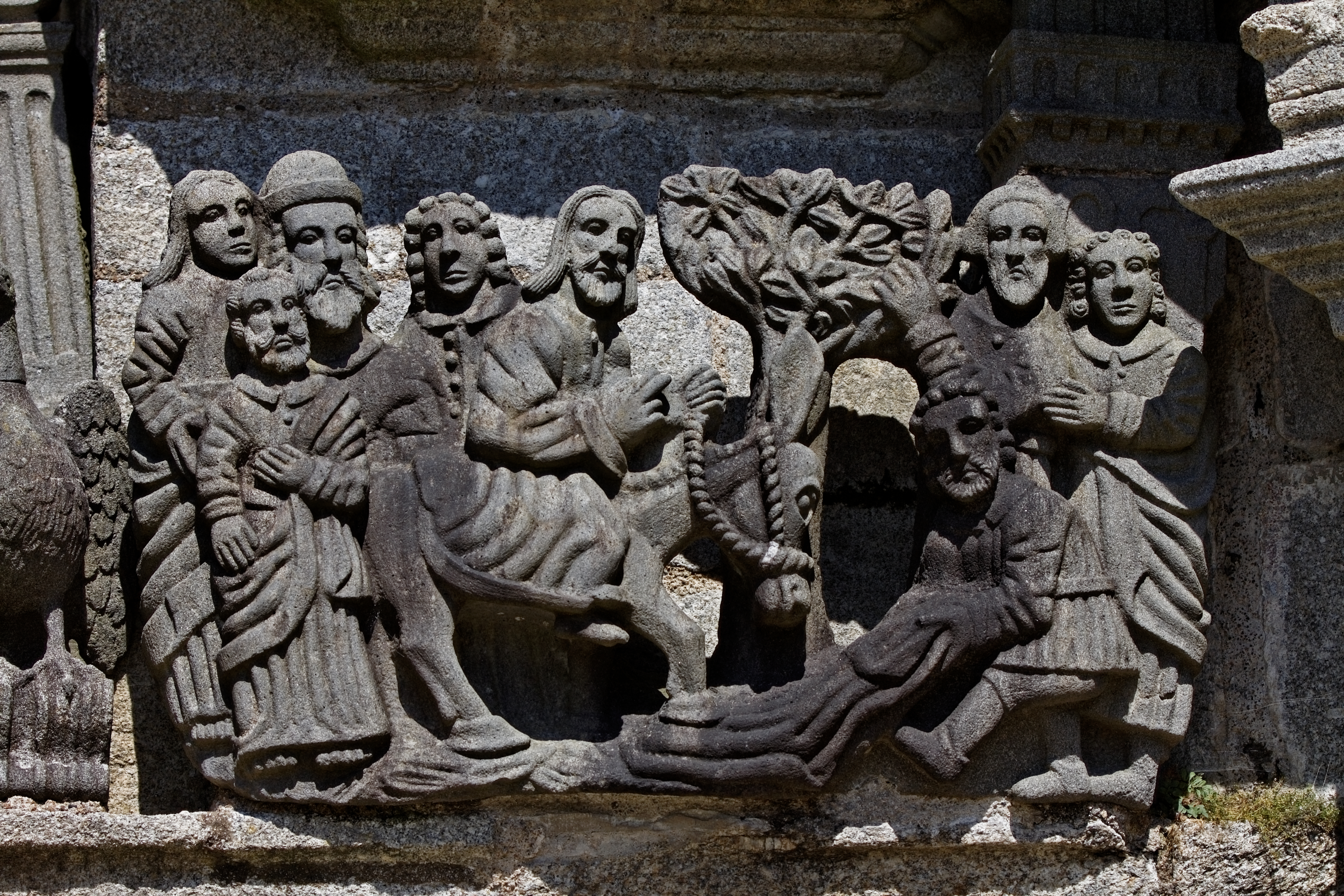 Vue du calvaire de l'enclos paroissial de Guimiliau.